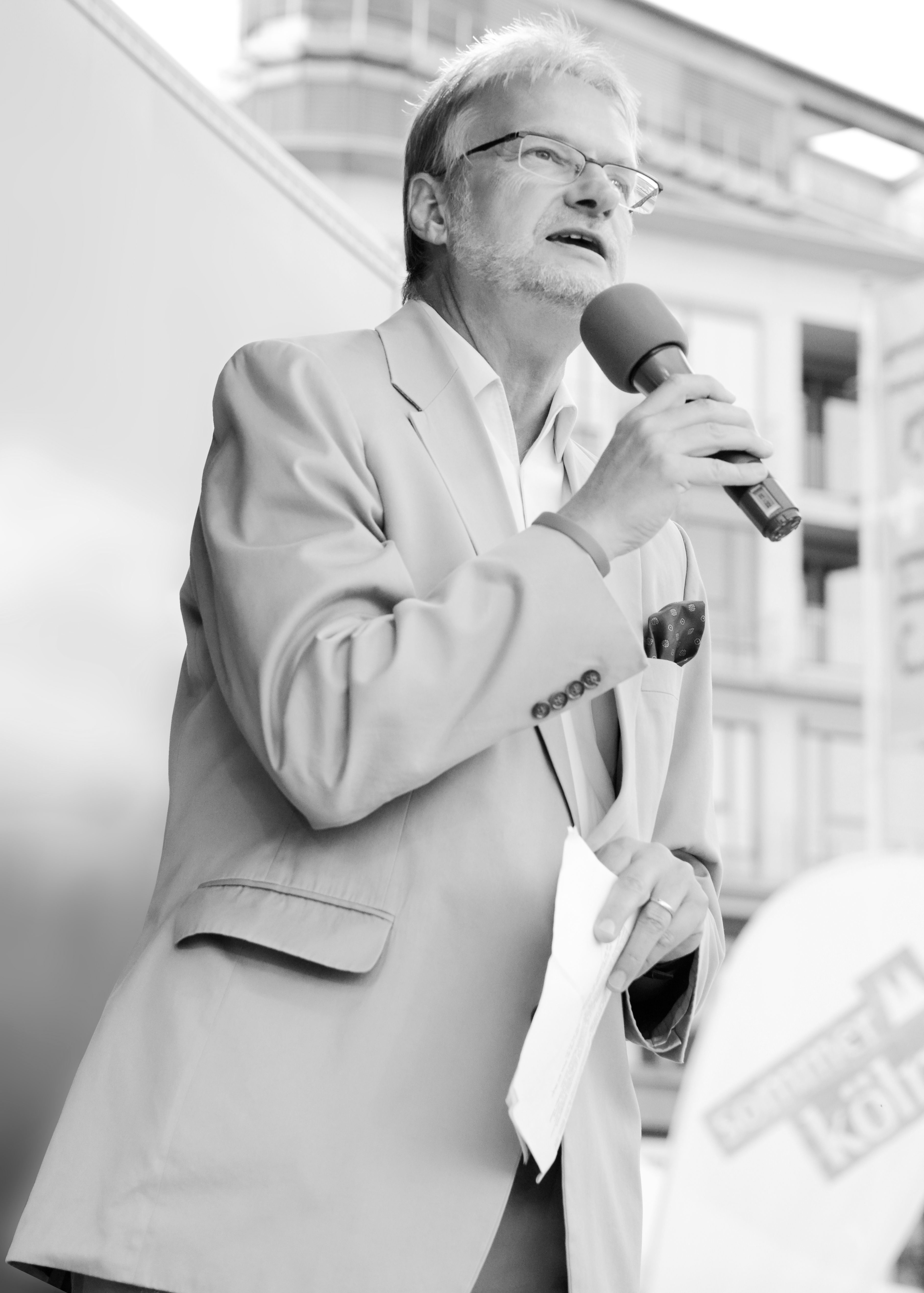 Professor Hans-Georg Bögner (* 03.01.1955 in Marburg an der Lahn) ist ein Kulturwissenschaftler und Kulturmanager in Köln. Er ist Vorstand der MedienStiftung Kultur, Geschäftsführer der SK Stiftung Kultur und der sk stiftung jugend und medien der Sparkasse KölnBonn.